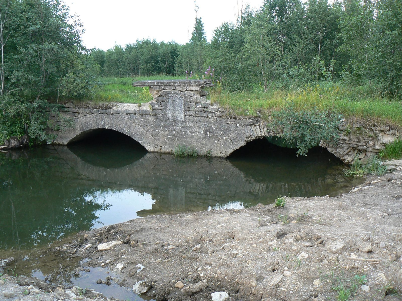 Andja kivisild